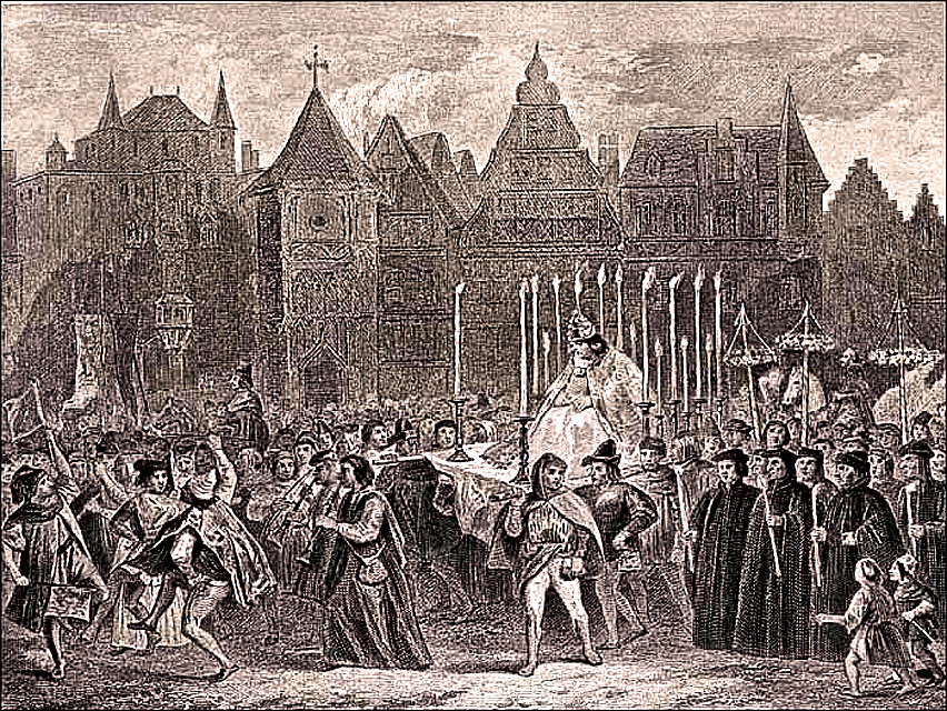 Quasimodo, le Roi des fous, à Notre-Dame de Paris, illustration de l'oeuvre de Victor Hugo